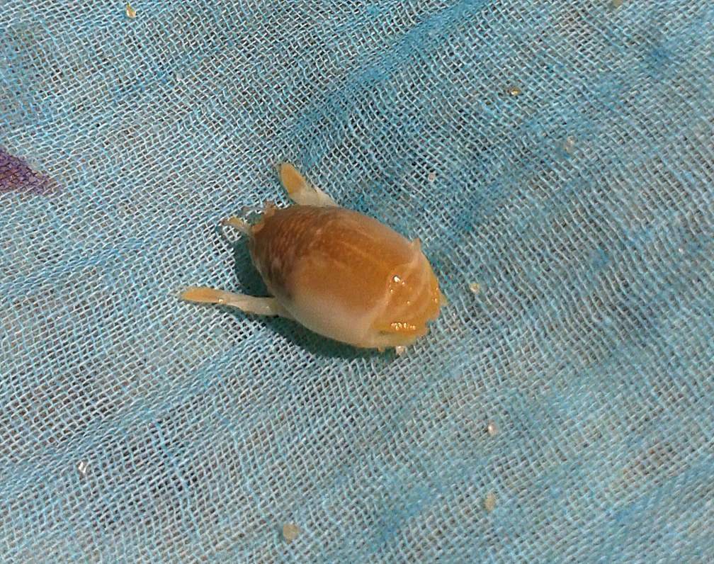 Tatuí encontrado na praia do Leblon, Rio de Janeiro.